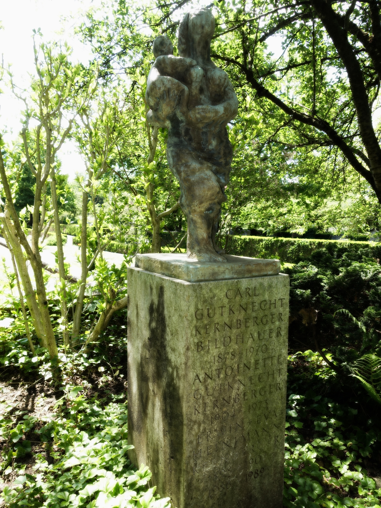 Carl Gutknecht-Kernberger (1878–1970) Bildhauer, Familiengrab auf dem Friedhof am Hörnli, Basel Bronzesockel signiert mit Giessermarke: "Cire perdue F. Amici Mendrisio"